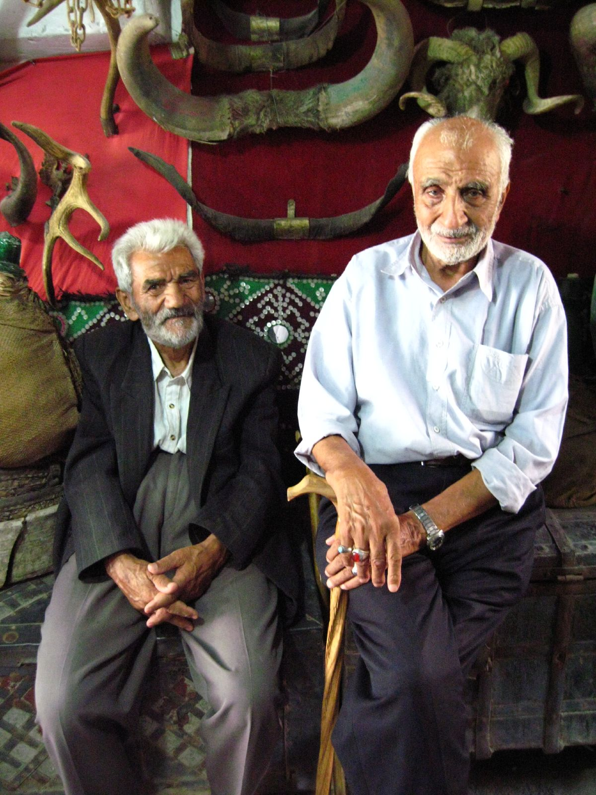 Make it quick, will ya!, Isfahan, Iran